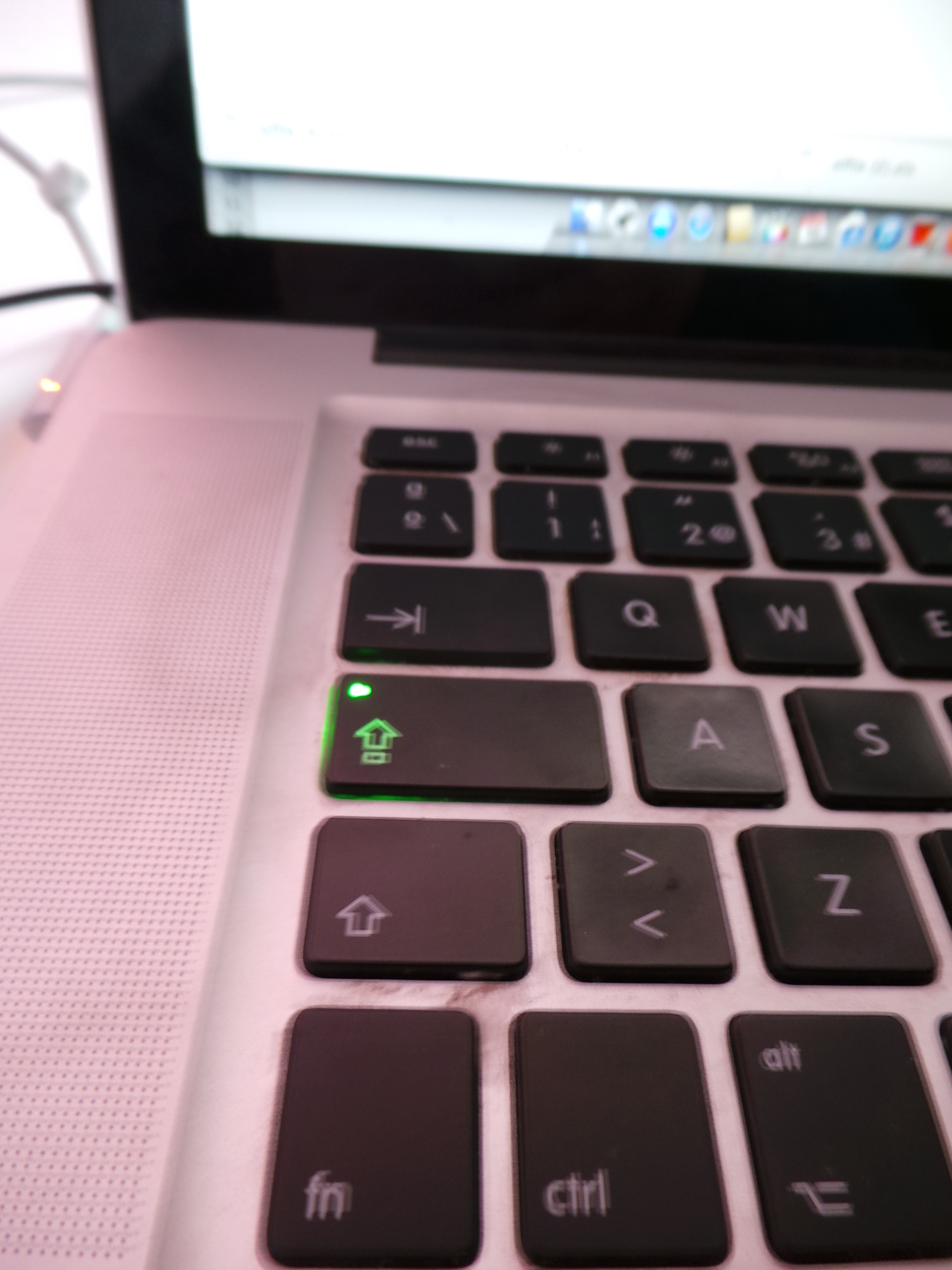 hidjdjjd